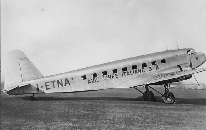 Fiat G-18 con marche I-ETNA, numero si serie 3, della ALI Avio Linee Italiane; il velivolo compì il primo volo nel 1935 e rimase distrutto in un incidente di prova presso Milano il 16 novembre 1942